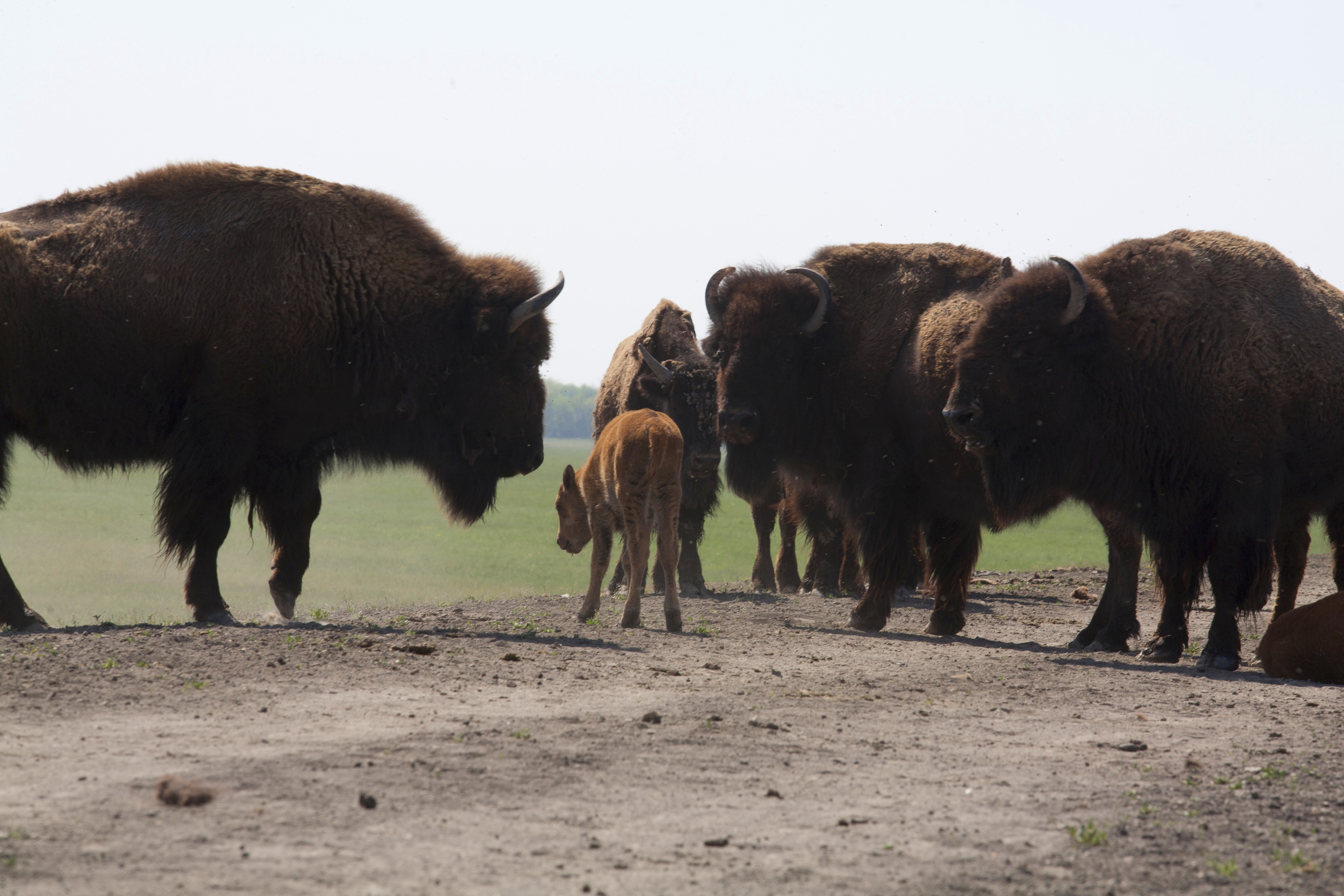 Зубри у Заповіднику Асканія-Нова